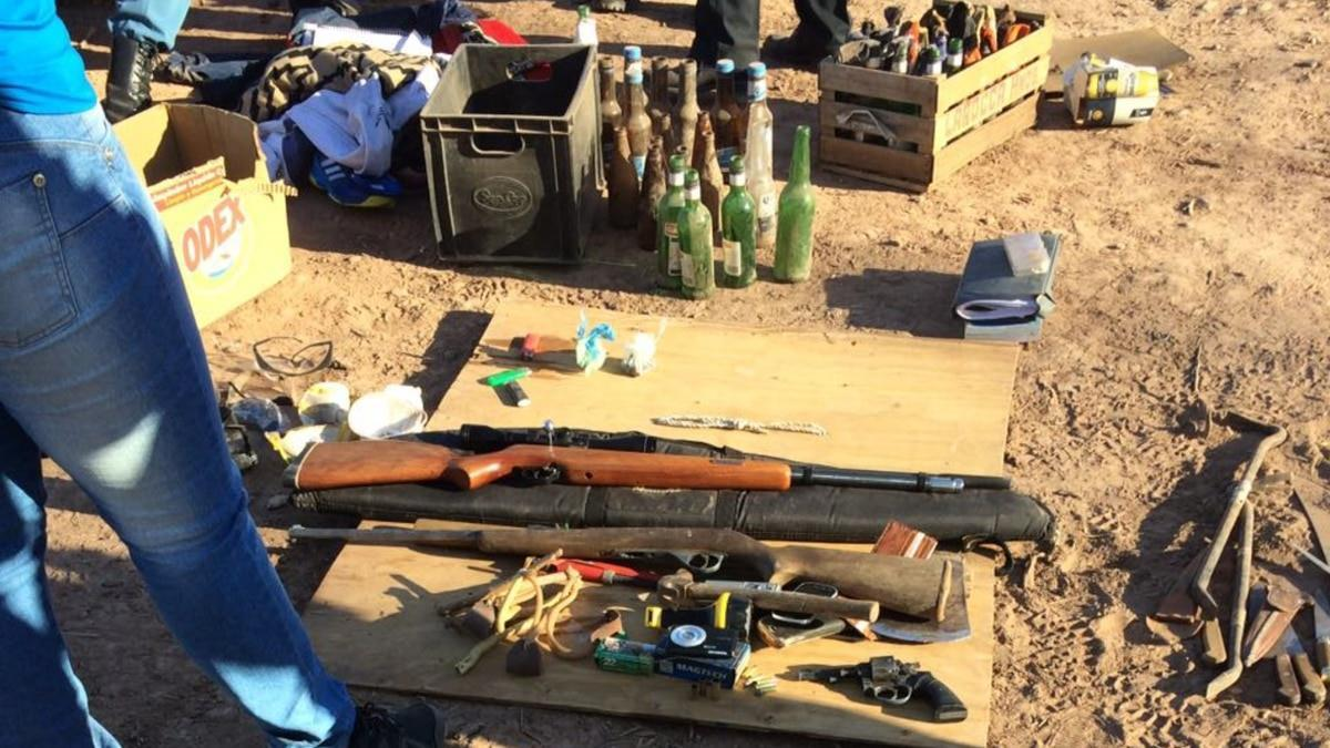 ELEMENTOS ENCONTRADOS EN ALLANAMIENTOS REALIZADOS EN EL MARCO DE LOS ATENTADOS INCENDIARIOS EN POZOS PETROLEROS Y EN LA CONCESIONARIA KUMENIA. NOVIEMBRE 2017.